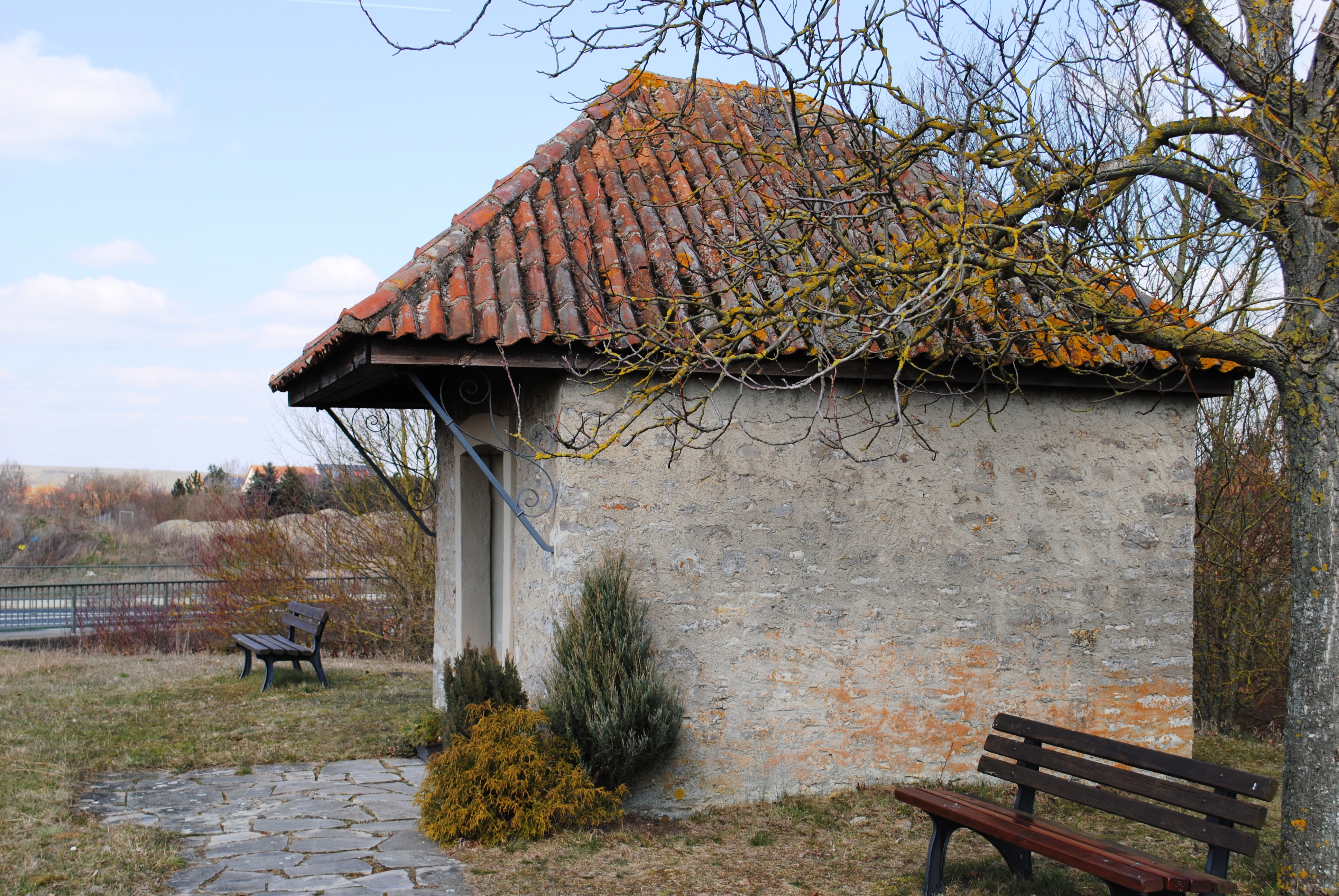 Wegkapelle, Volkach, kleiner Bruchsteinbau mit Pyramidendach, mit Pietà, bez. 1897; an der Straße nach Dimbach